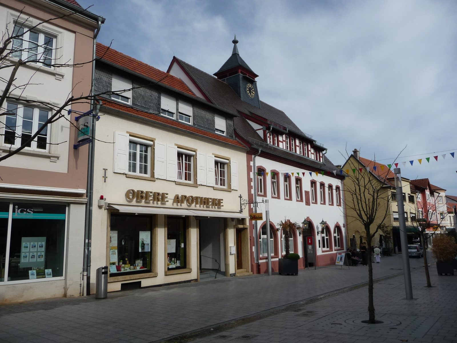 Grünstadt